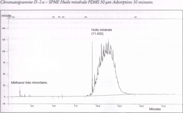 chromatogramme spme